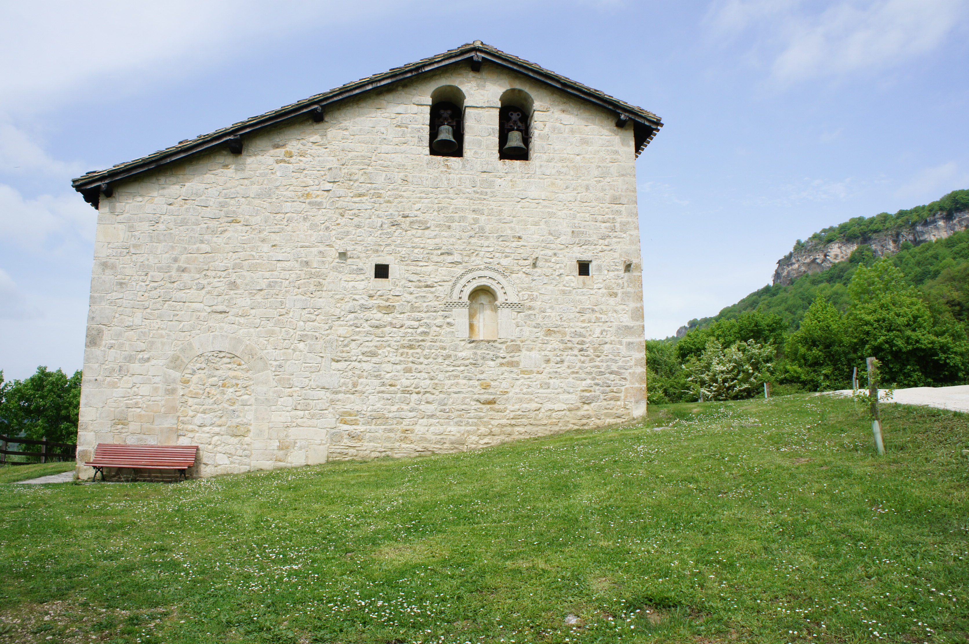 Fachada oriental de la Ermita de San Juan Bautista en la que se aprecia un ventanal de orden románico, en el municipio navarro de Eulate, Navarra, España.